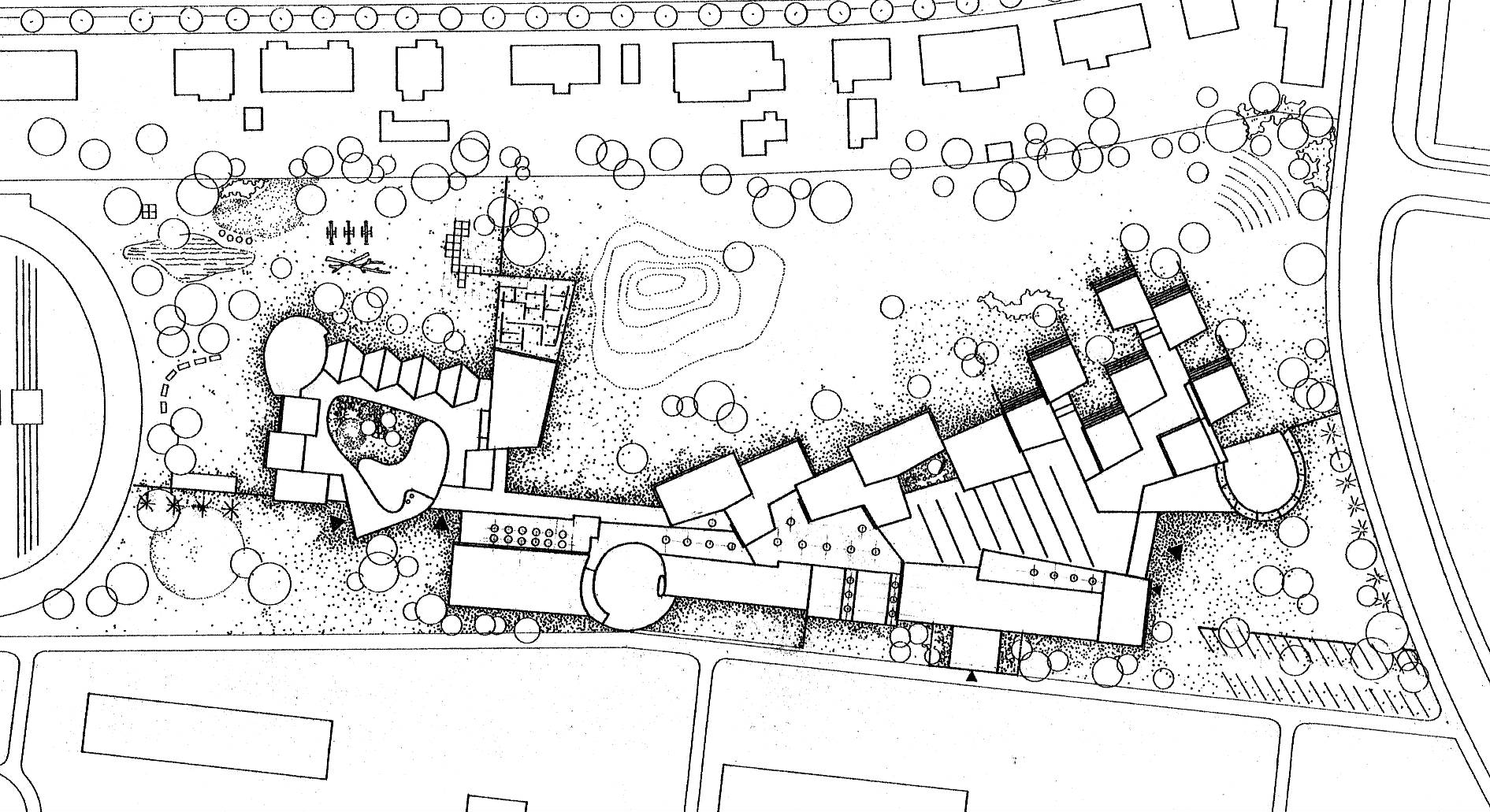 Lageplan der Friedrich Ebert Schule mit Kinderhaus